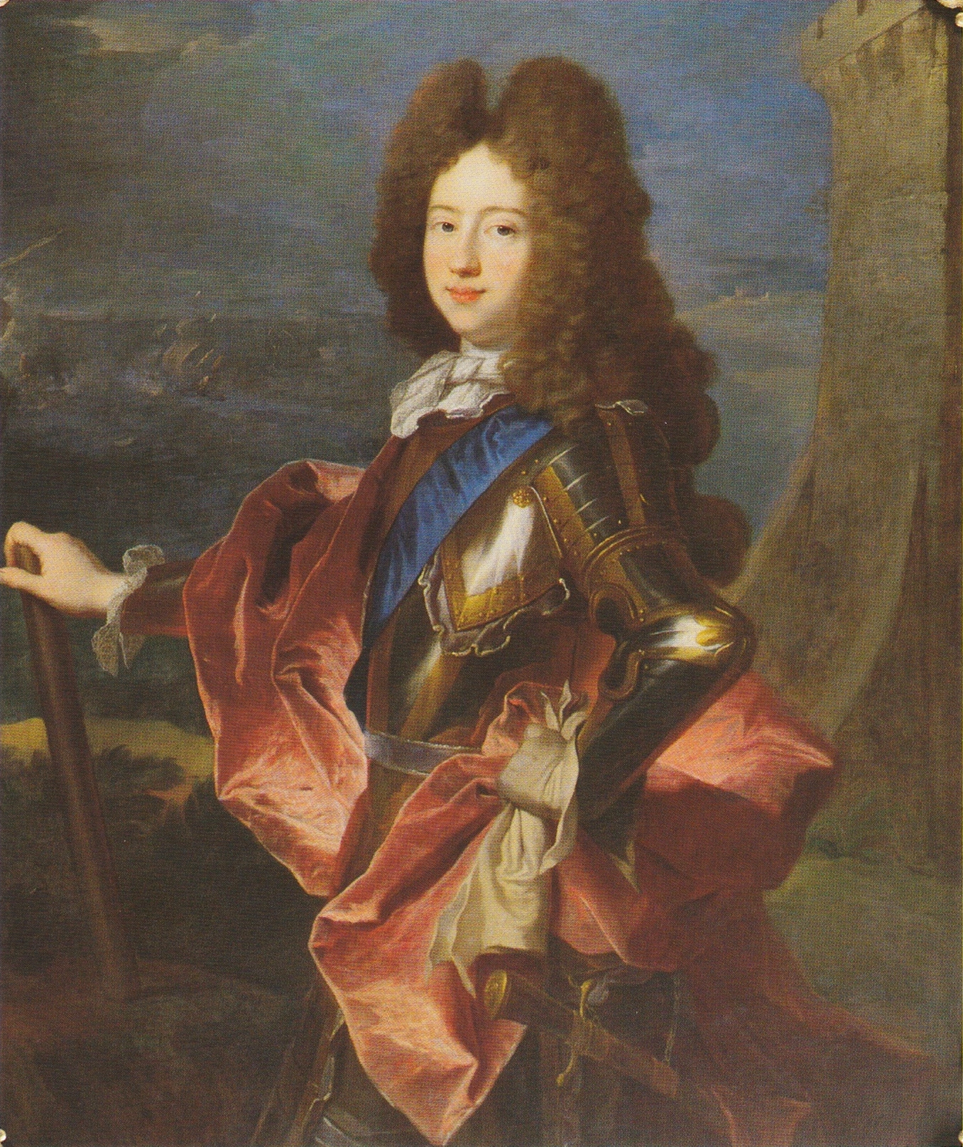 Ulrik Christian Gyldenløve (1678-1719)